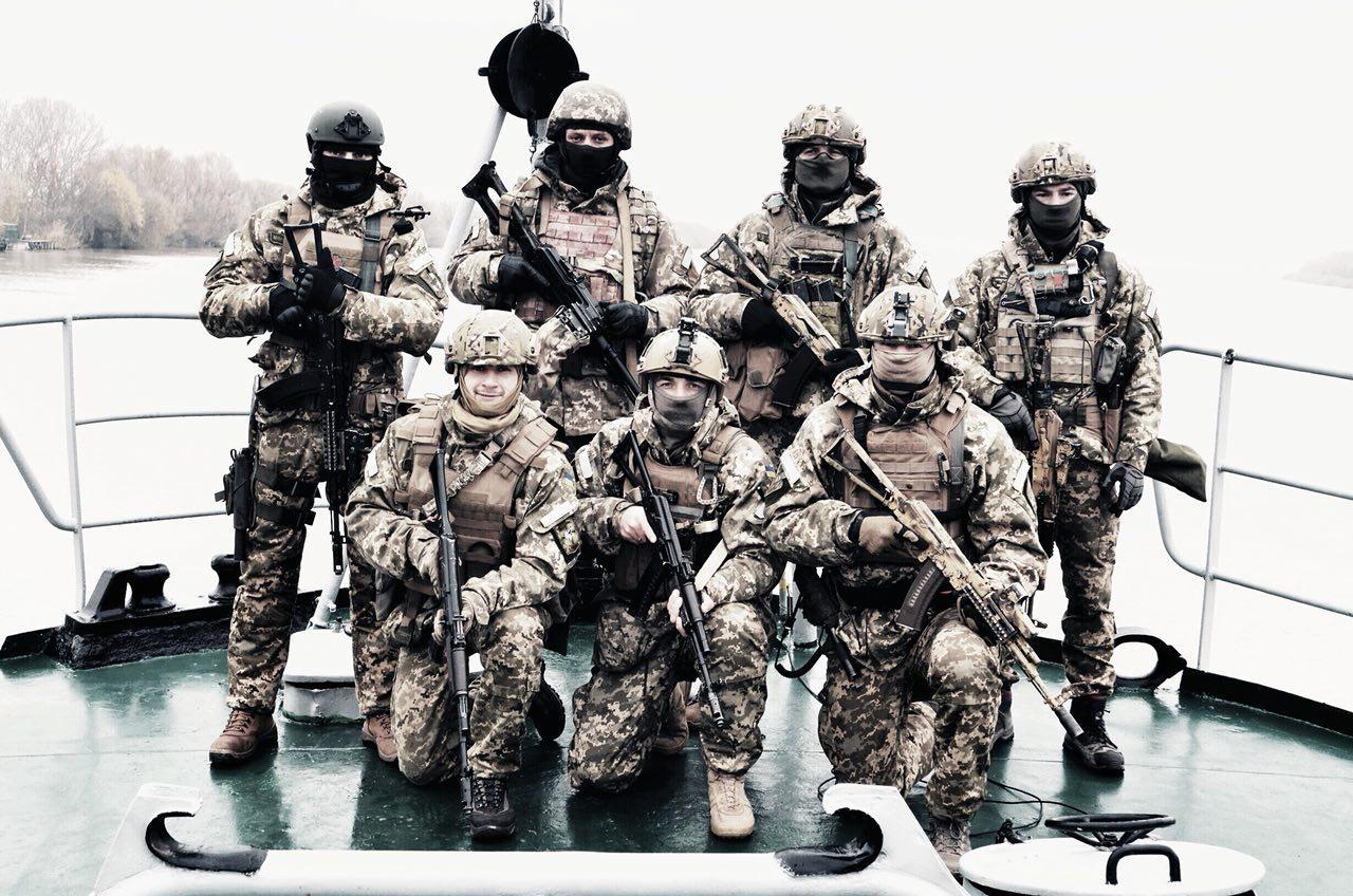 Збірна десантна група з 1-ОБМП. Фото: К2Р Сілкін Є.